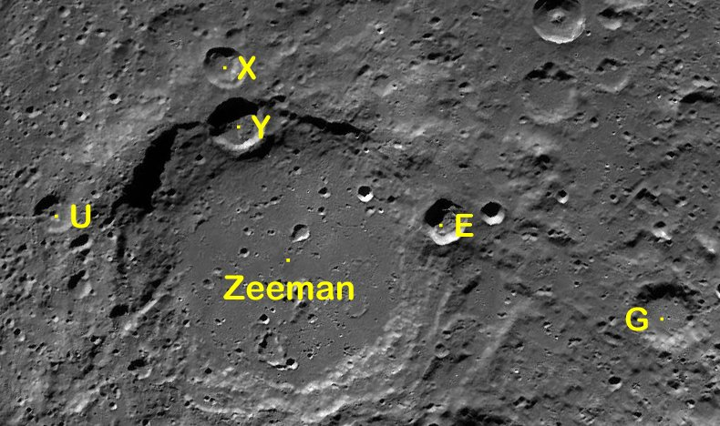 Cráter lunar Zeeman. Cráteres satélite. (Imagen LRO)